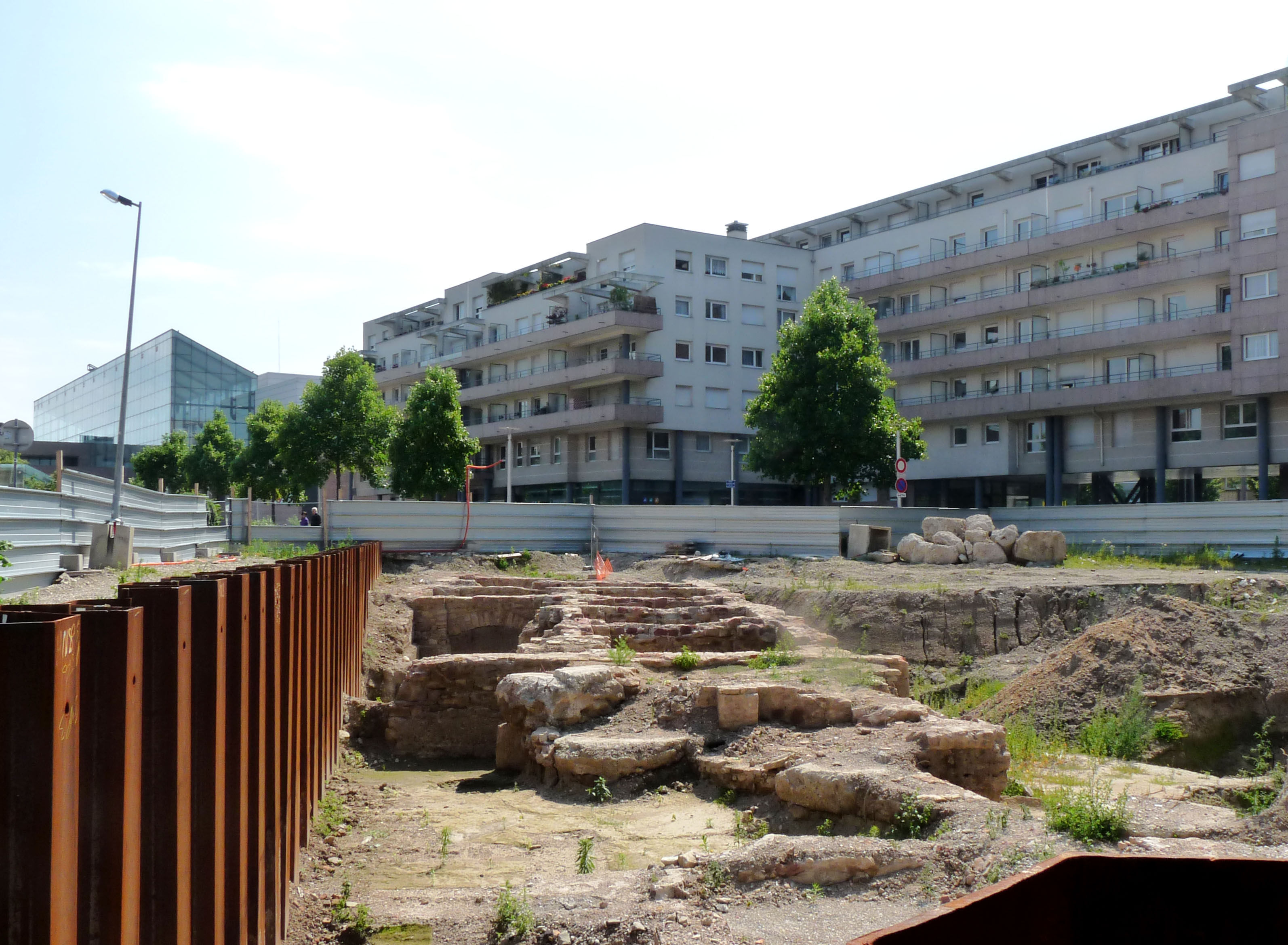 Archéologie préventive à Strasbourg, près des bâtiments de l'Ecole nationale d'Administration (ENA), non visibles sur la photo. Au fond, le Musée d'art moderne et contemporain